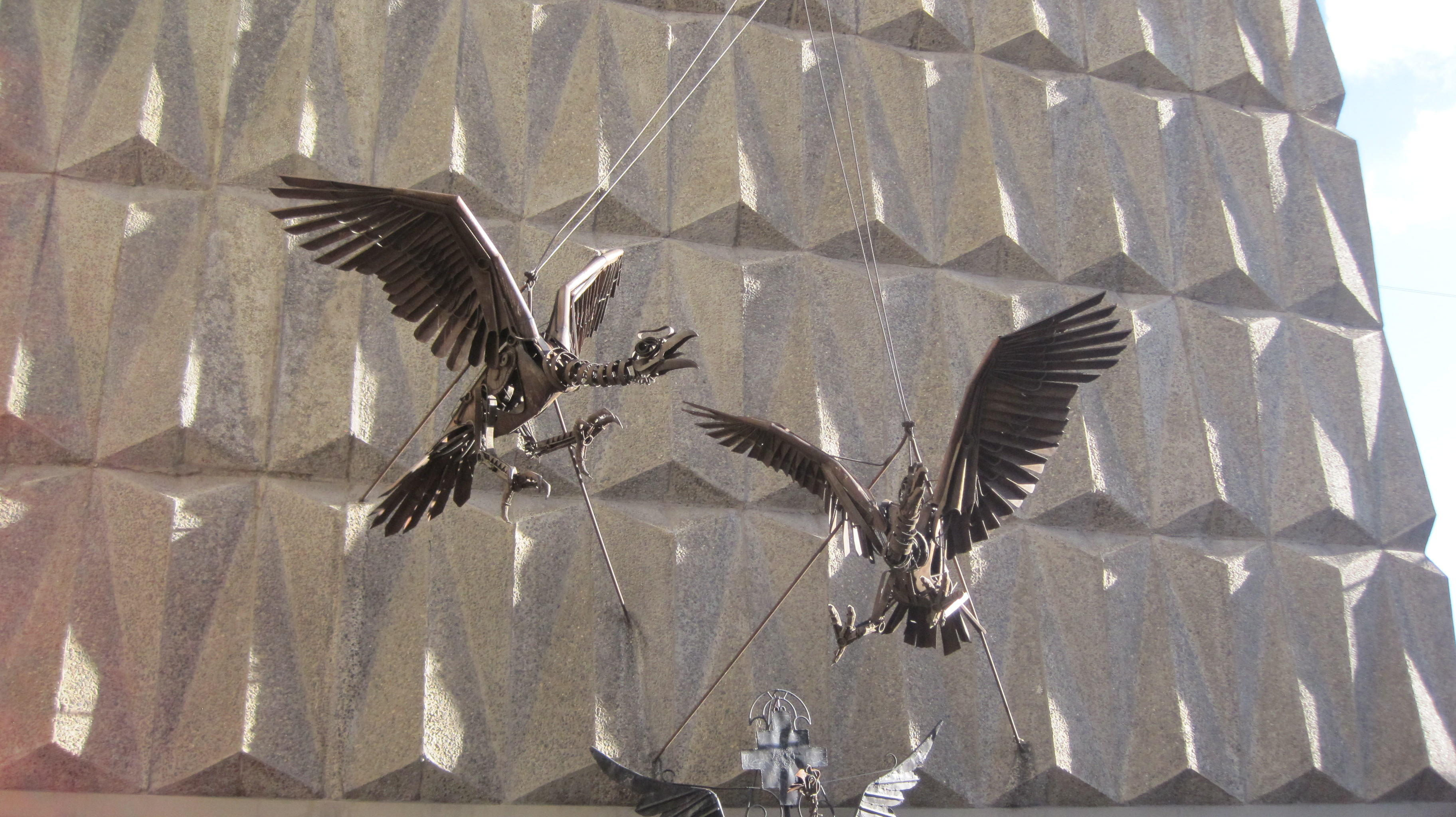 Cóndores This medium shows the protected monument with the number L/00-214 in Bolivia.